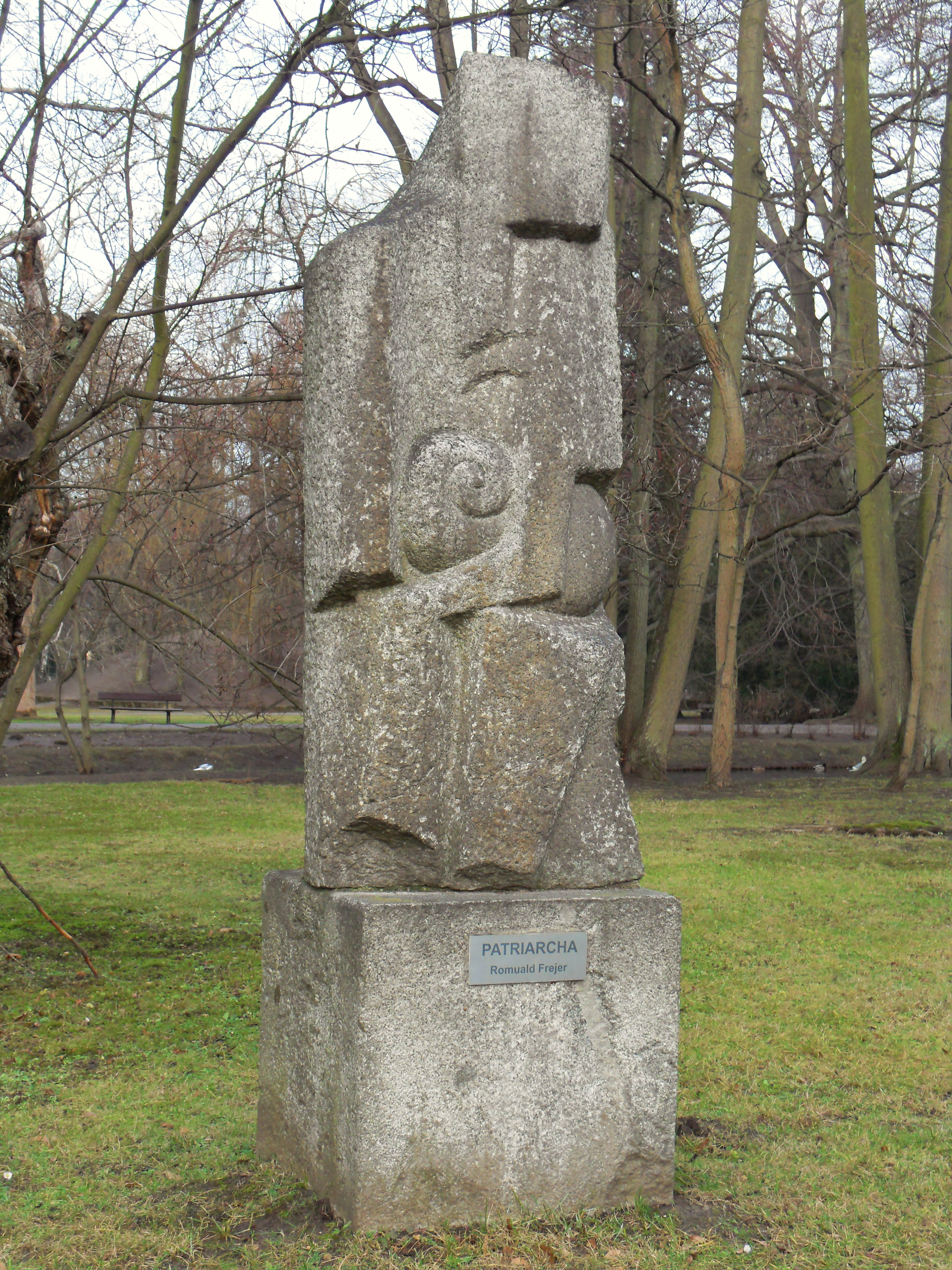 Park Oliwski, rzeźba "Patriarcha", autor Romuald Frejer.